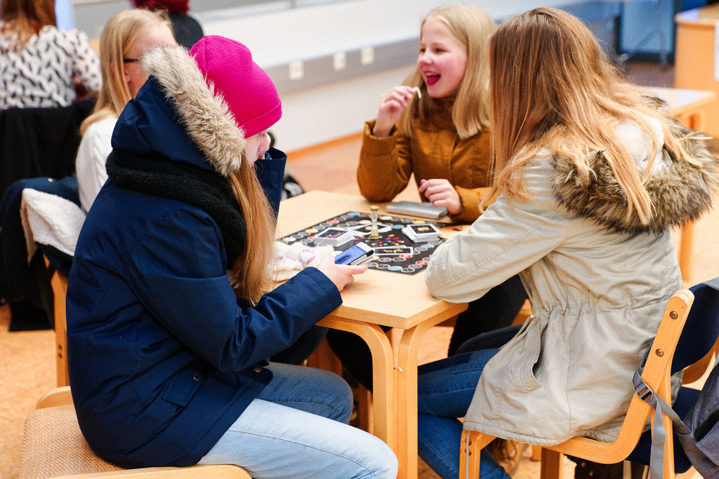 Vuoden 2016 pelipäivä Iisalmen kaupunginkirjastossa